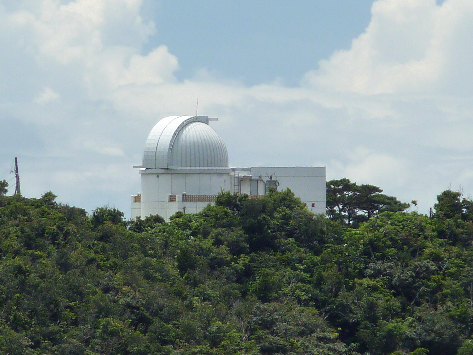 石垣天文台（沖縄県石垣市）